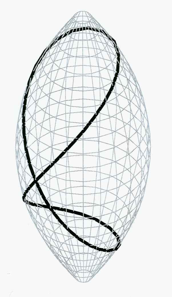 עקום גאודזי על פוטבול